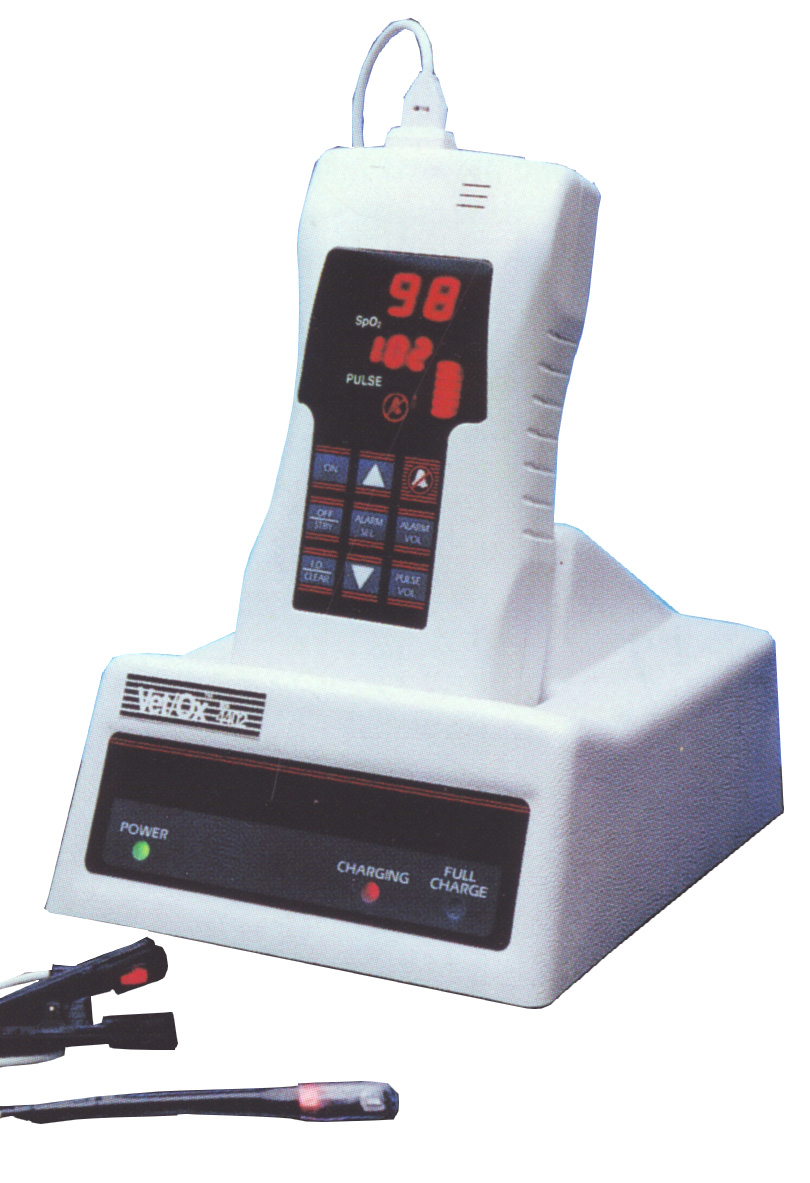 Een Pulse-oxymeter